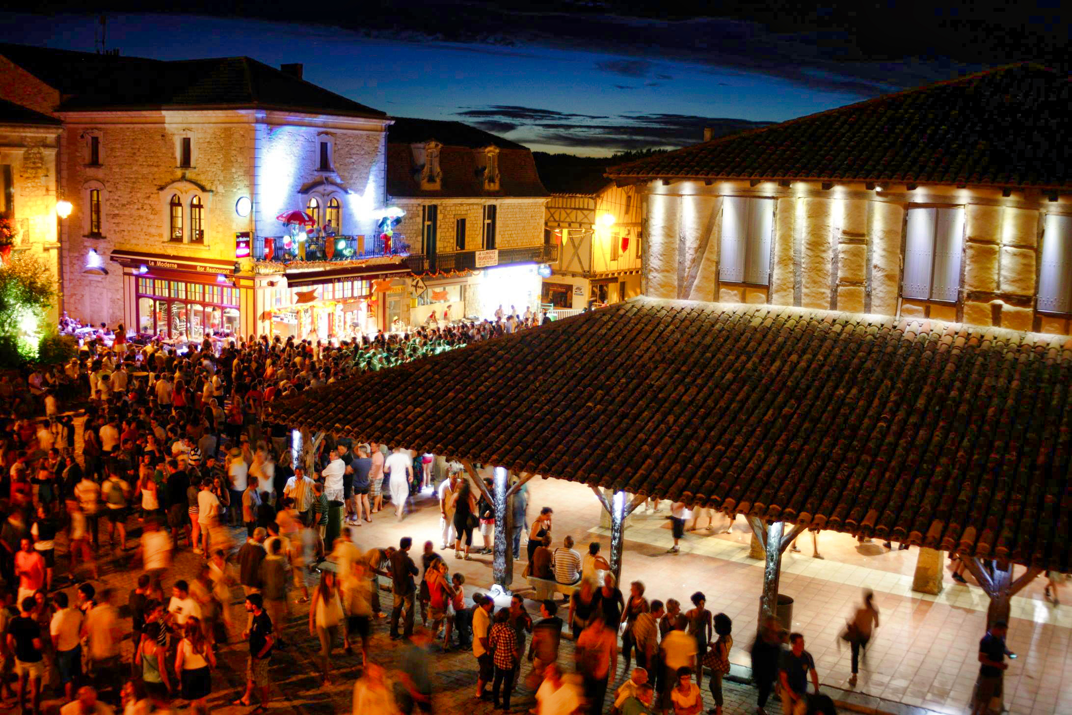 Fête de la Bodéga, place de la halle.